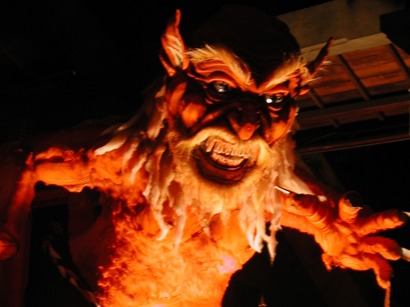 an Ogoh-Ogoh!